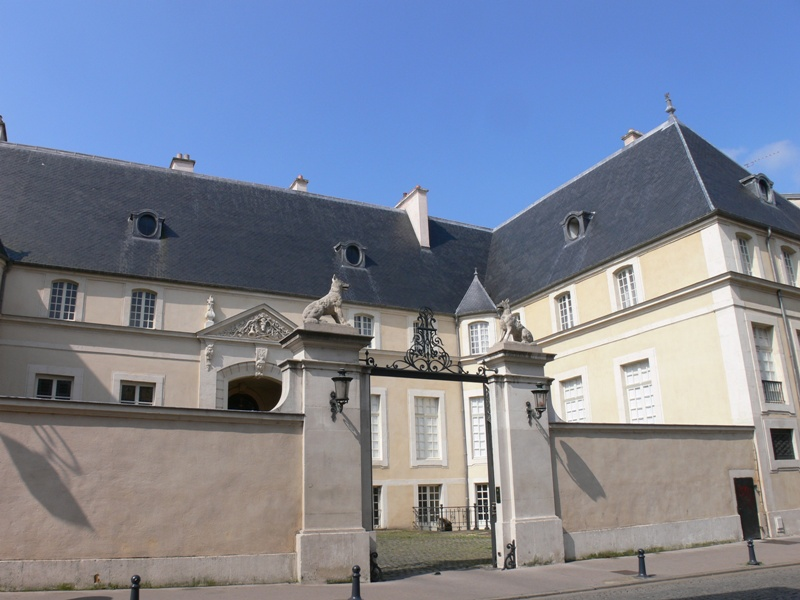 Hôtel des Loups, Nancy, Lorraine, France